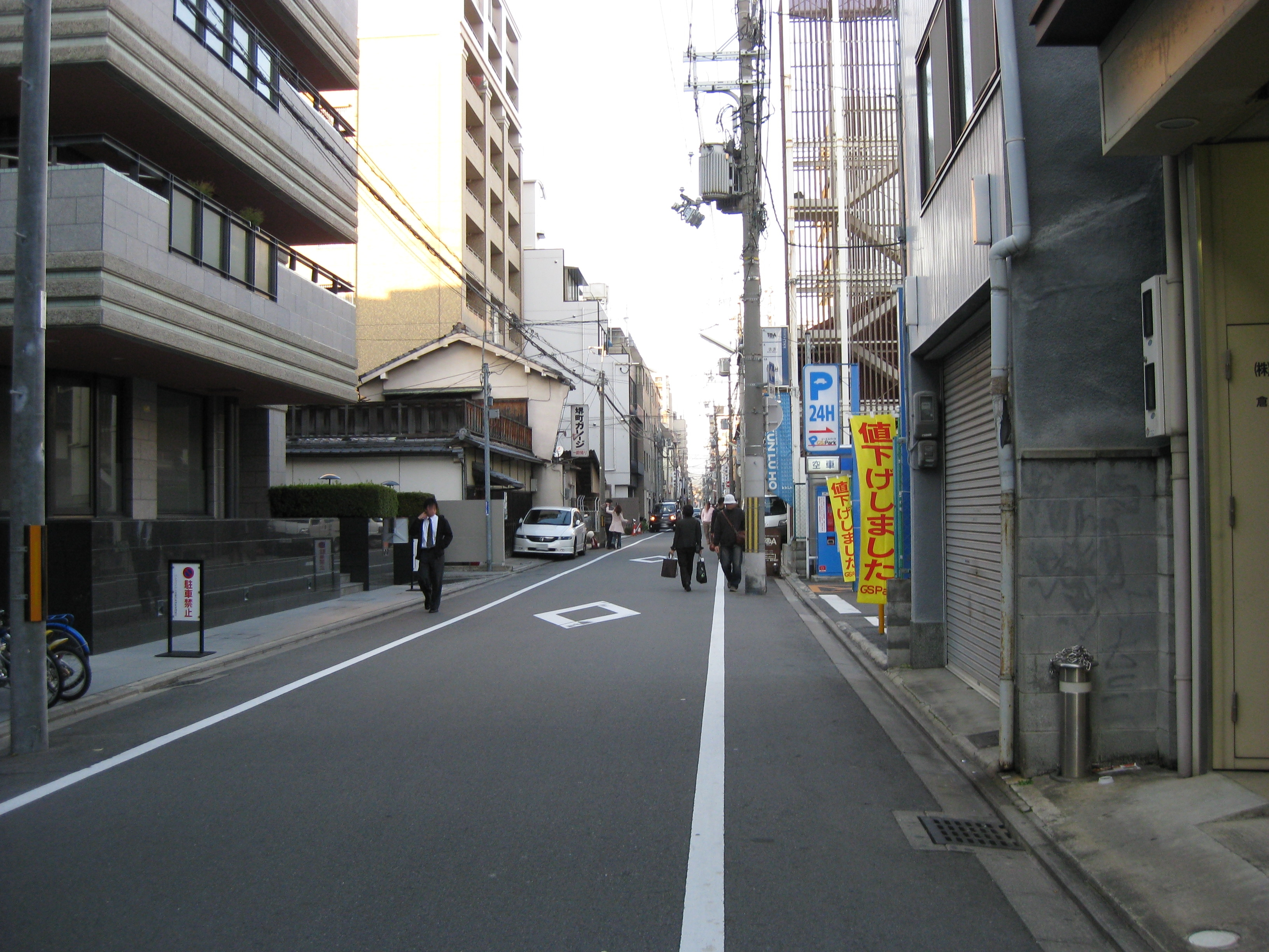 堺町通。蛸薬師通より北方向